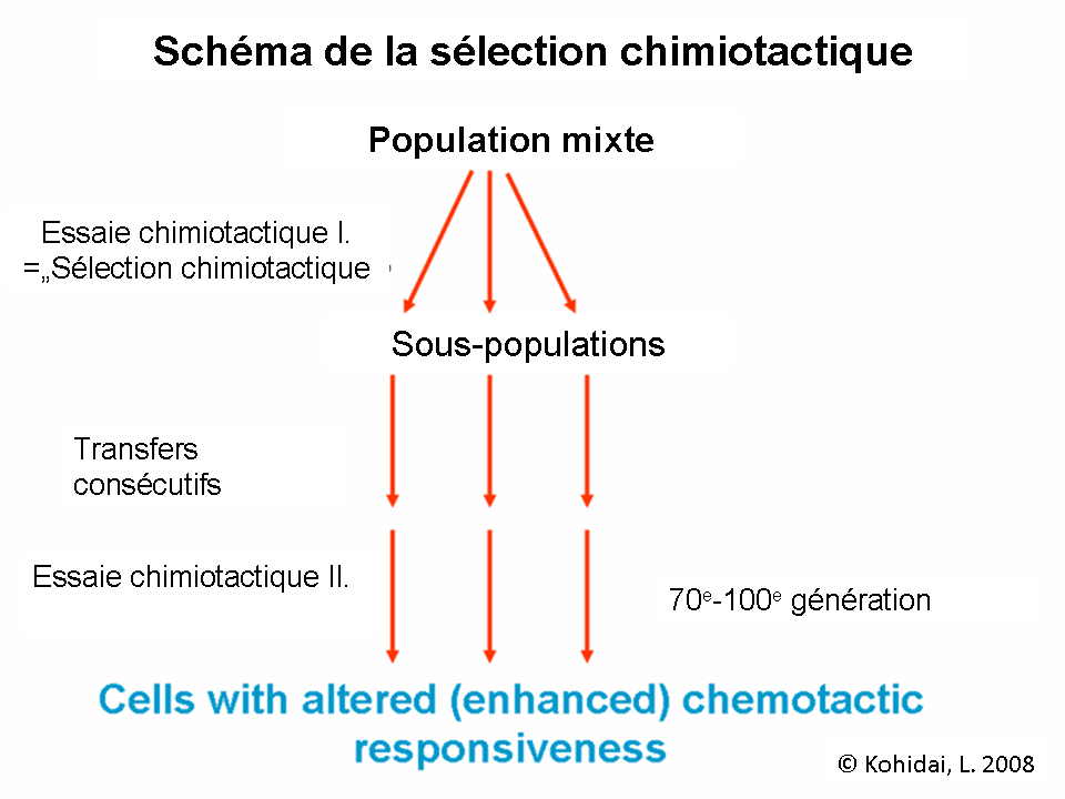 Schéma de la sélection chimiotactique